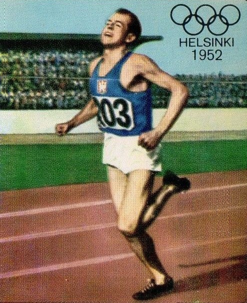 Emil Zatopek en 1952 - Campioni dello Sport 1968-1969, n°470